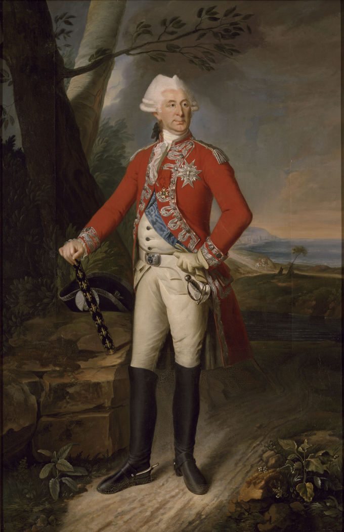 Charles-Eugène-Gabriel de La Croix, marquis de Castries, maréchal de France en 1783 (1727-1801)